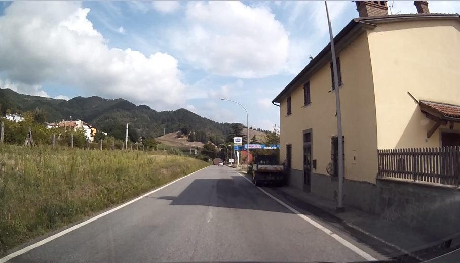 Marradi, frazione Casa Carloni